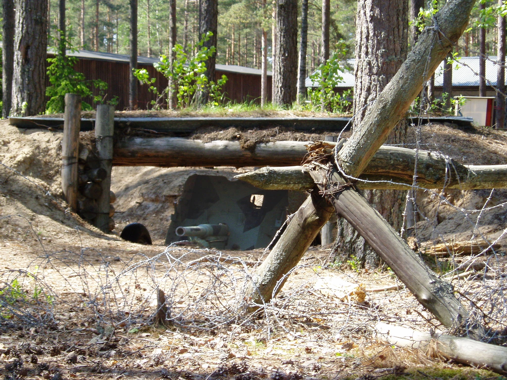 M-32 45 K. Photo by Ohto Kokko.